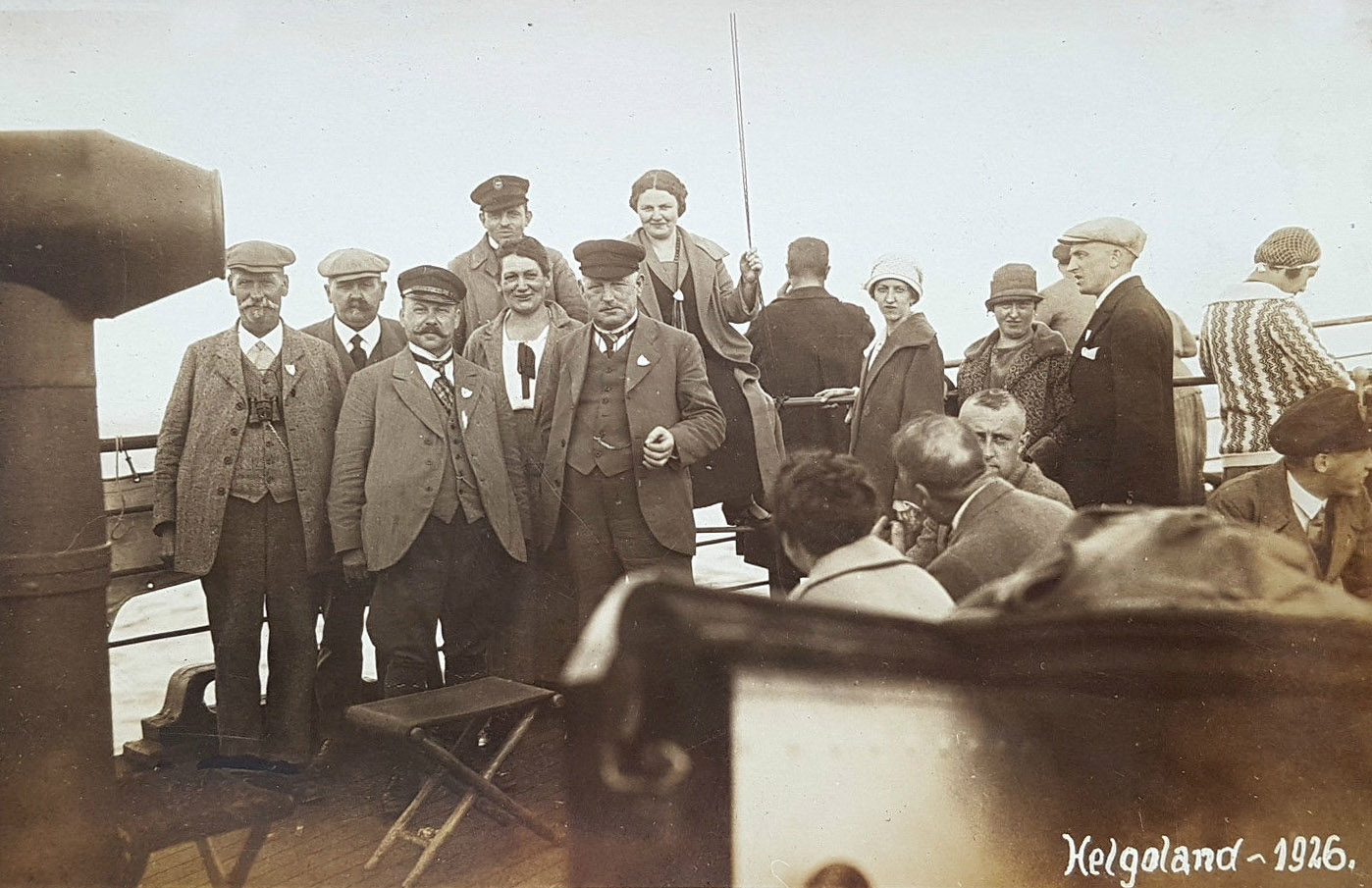 Ausflugsgäste nach Helgoland 1926